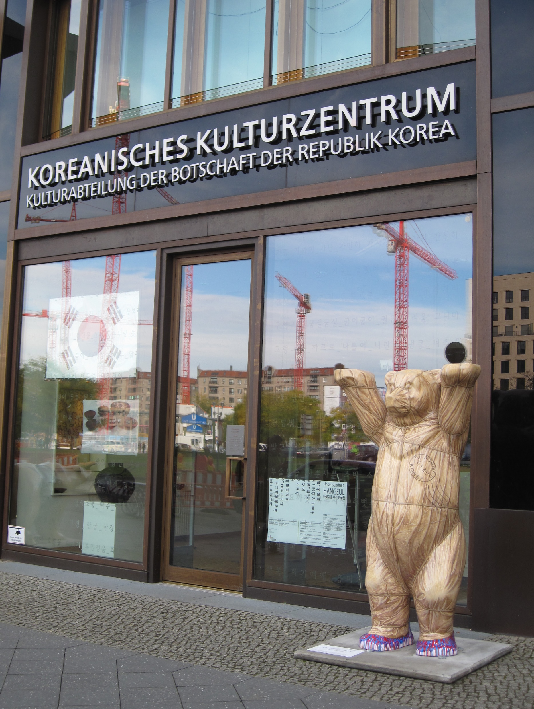 Buddy Bär „발견 (Balgyeon) – Ent▪deckung – Dis▪covery“ in Berlin, Leipziger Platz 3 vor dem Koreanischen Kulturzentrum. Informationstafel: 발견 – Ent▪deckung – Dis▪covery Künstler: Junggeun OH In der Hoffnung auf die unveränderliche Freundschaft zwischen Korea und Deutschland steht der Bär, das Symbol der deutschen Hauptstadt und die Wurzel des Koreanischen Volkes, heute vor dem Koreanischen Kulturzentrum. September 2012.